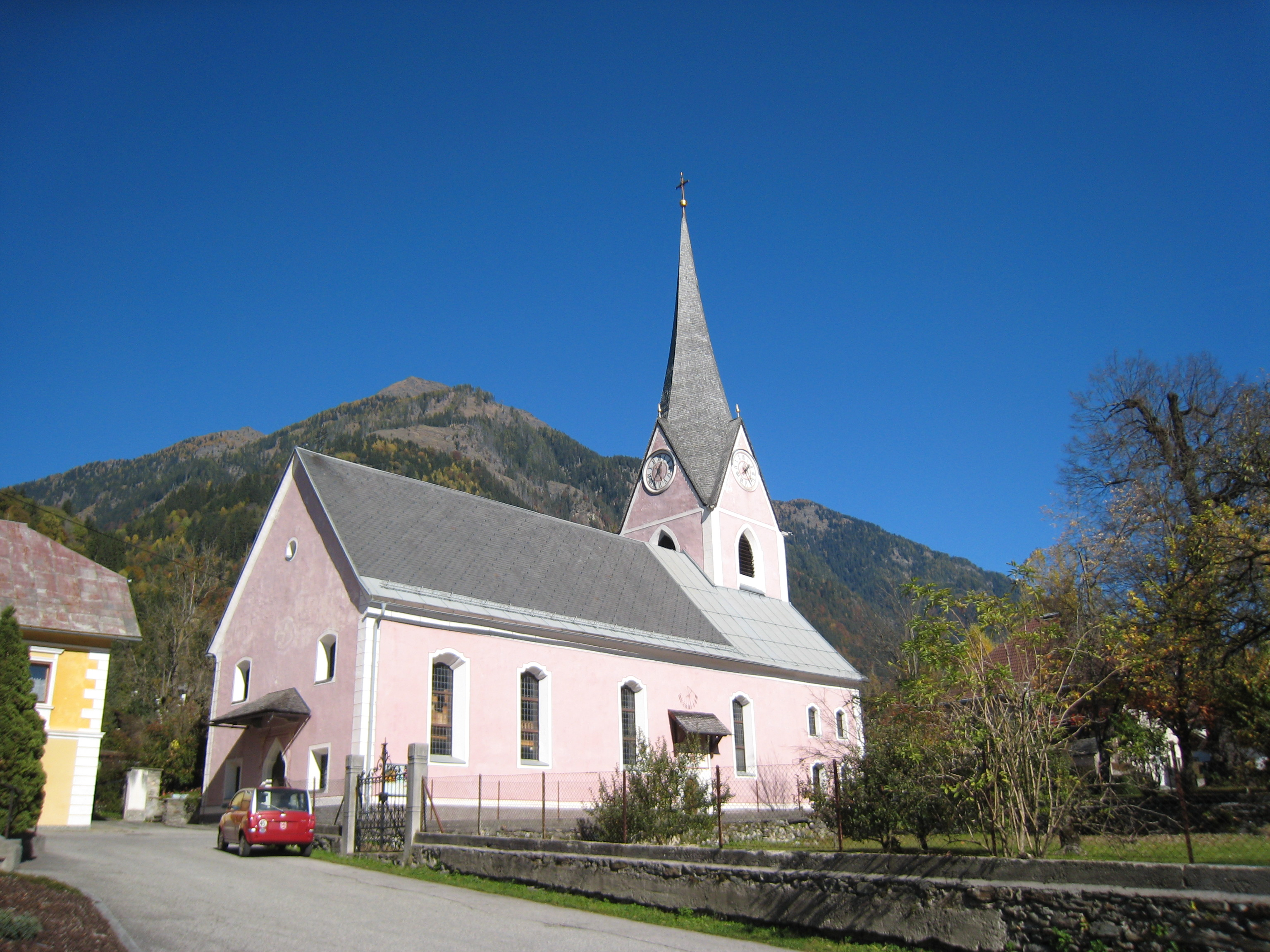 Pfarrkirche in Steinfeld, Kärnten. Im Hintergrund der Stagor, 2289 m, in der Kreuzeckgruppe.